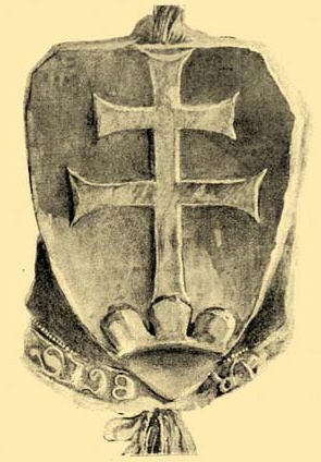 Václav III. - pečeť